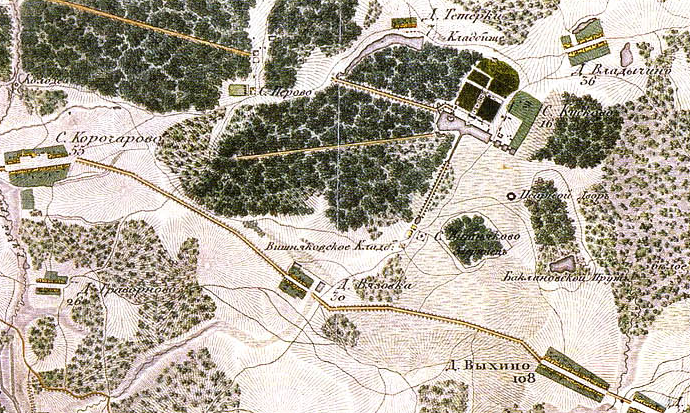 Участок. Топографическая карта окружности Москвы, снятая офицерами Квантирмейстерской части 1818 года. Гравирована и печатана в военно-топографическом бюро при главном штабе его импереторского Величества 1823 года.